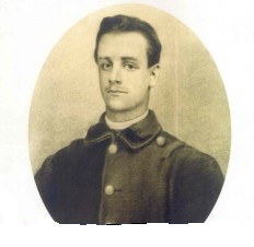 Pietro Barsanti (né le 30 juillet 1849 à Borgo a Mozzano, dans le Grand-duché de Toscane, mort à Milan le 27 août 1870) est un militaire italien.